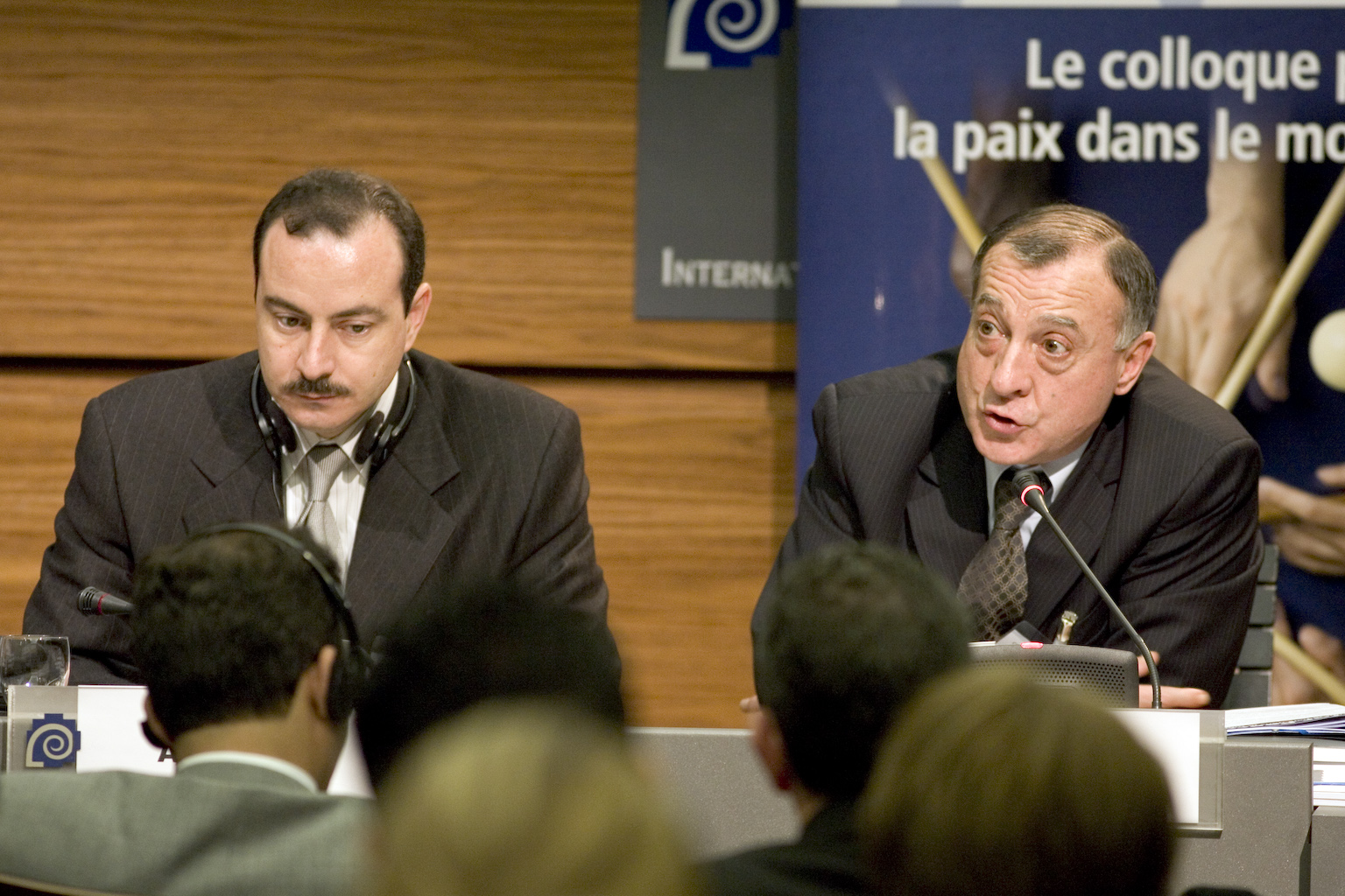 Charles Saint-Prot et Ayman Abdel Nour, journaliste, au colloque "Axis for Peace"